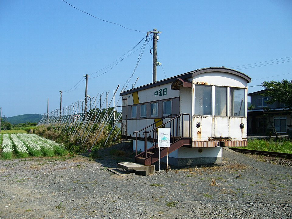 江差線 中須田駅